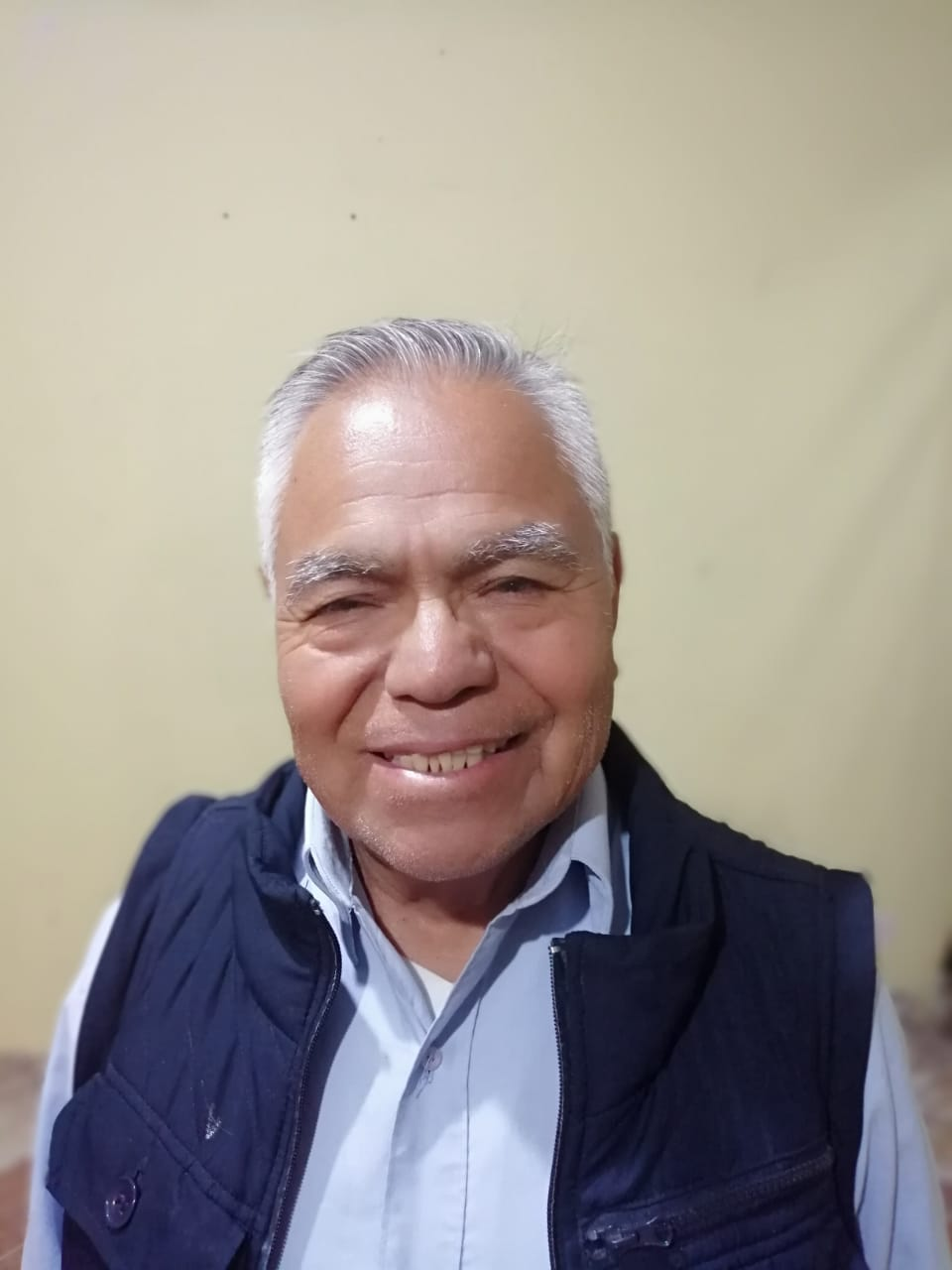 El escritor mixteco Lorenzo Hernández Ocampo